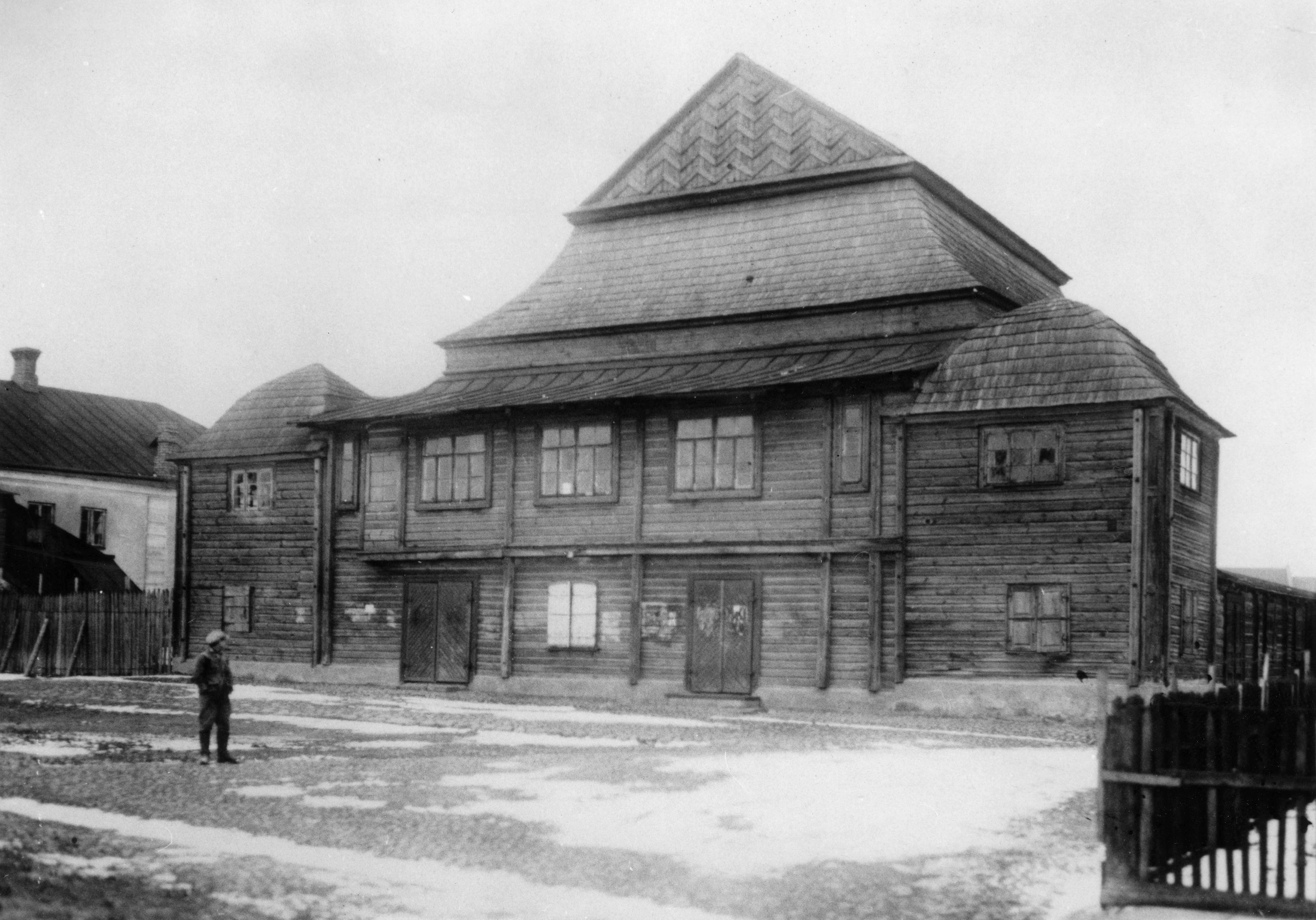 Беларуская (тарашкевіца): Горадня (Horadnia), Занёманскае прадмесьце (Zaniomanskaje pradmieście). Занёманская сынагога